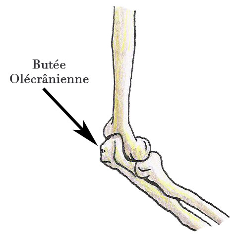 Yoga anatomie